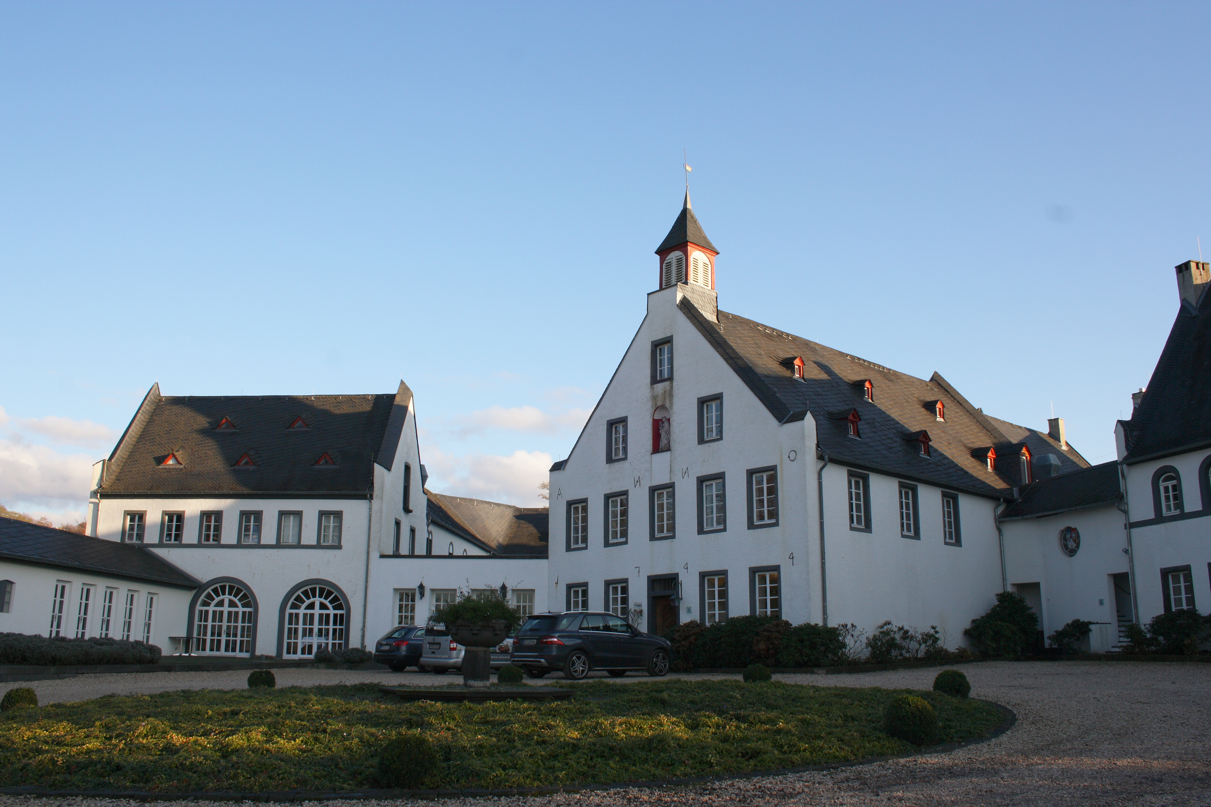 Hofgut Besselich in Urbar (bei Koblenz) im Landkreis Mayen-Koblenz (Rheinland-Pfalz)